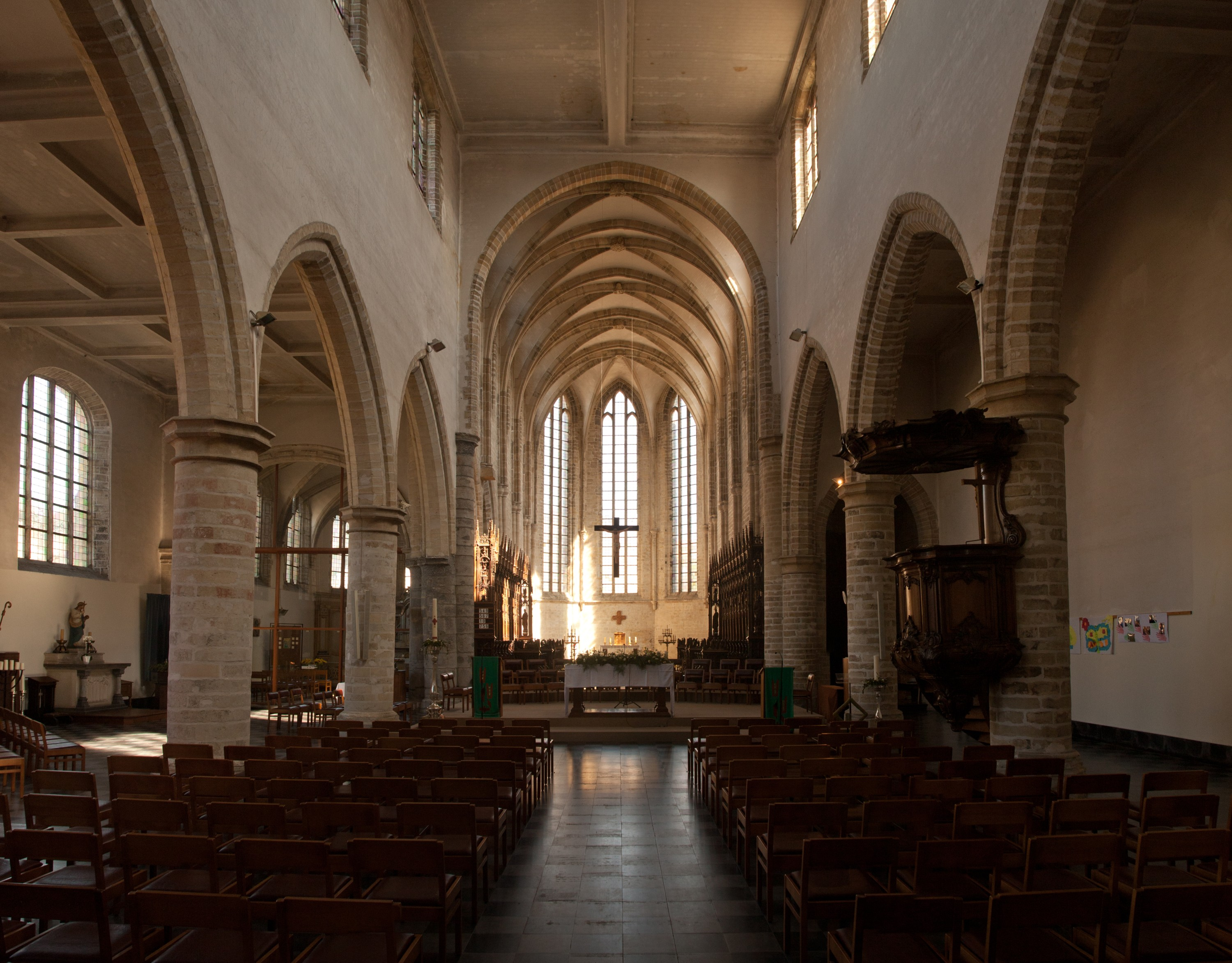 Zicht op het schip van de Sint Geertruikerk te Leuven